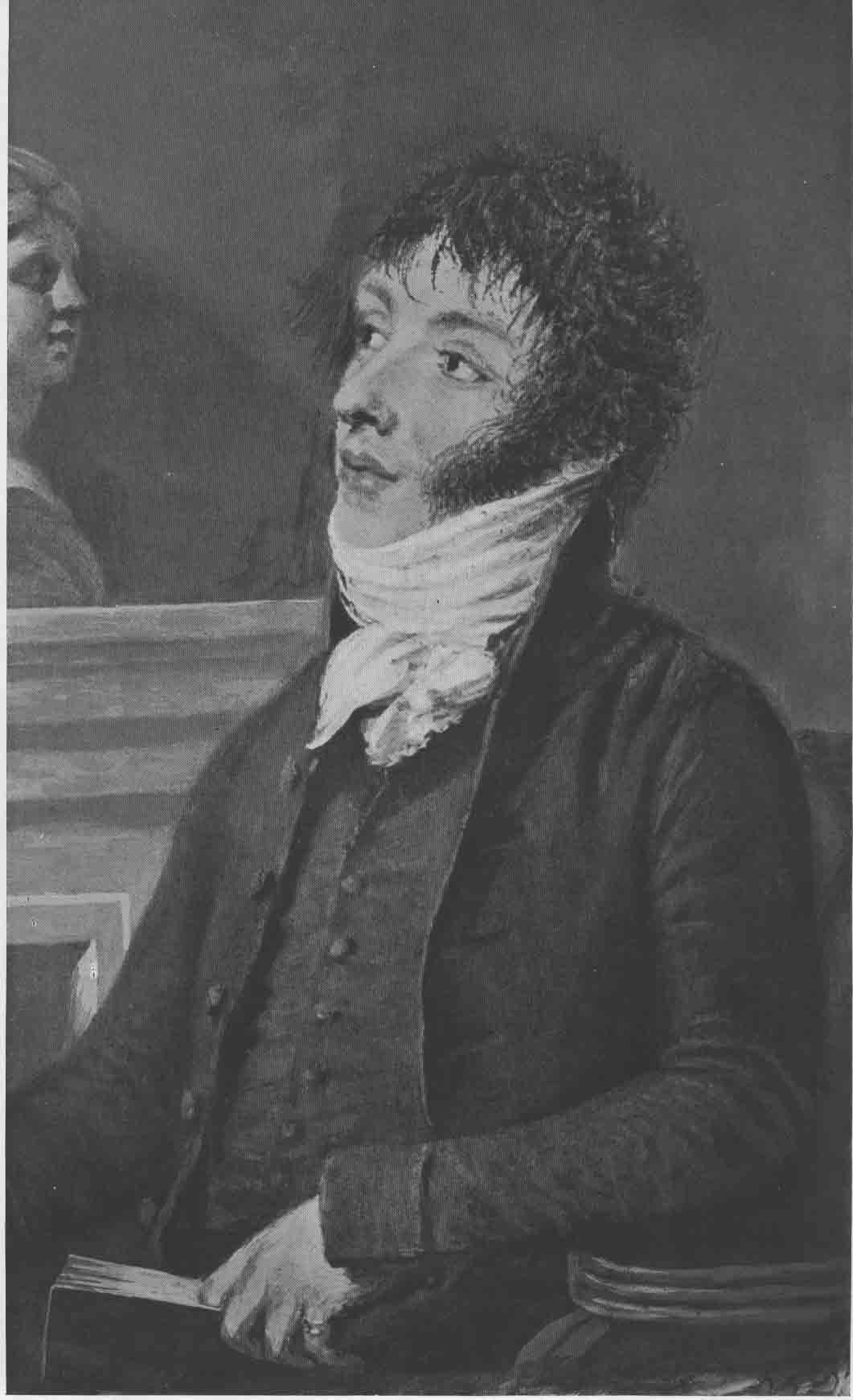 Batyushkov's portrait by Orest Kiprensky (1815).